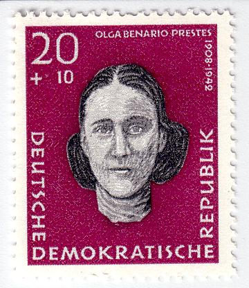 Briefmarke der Post der DDR von 1959 (Michel-Nr.718).Auflage:3.000.000